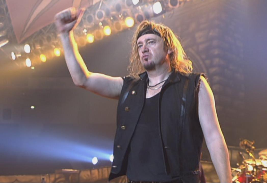 foto rappresentante Adrian Smith